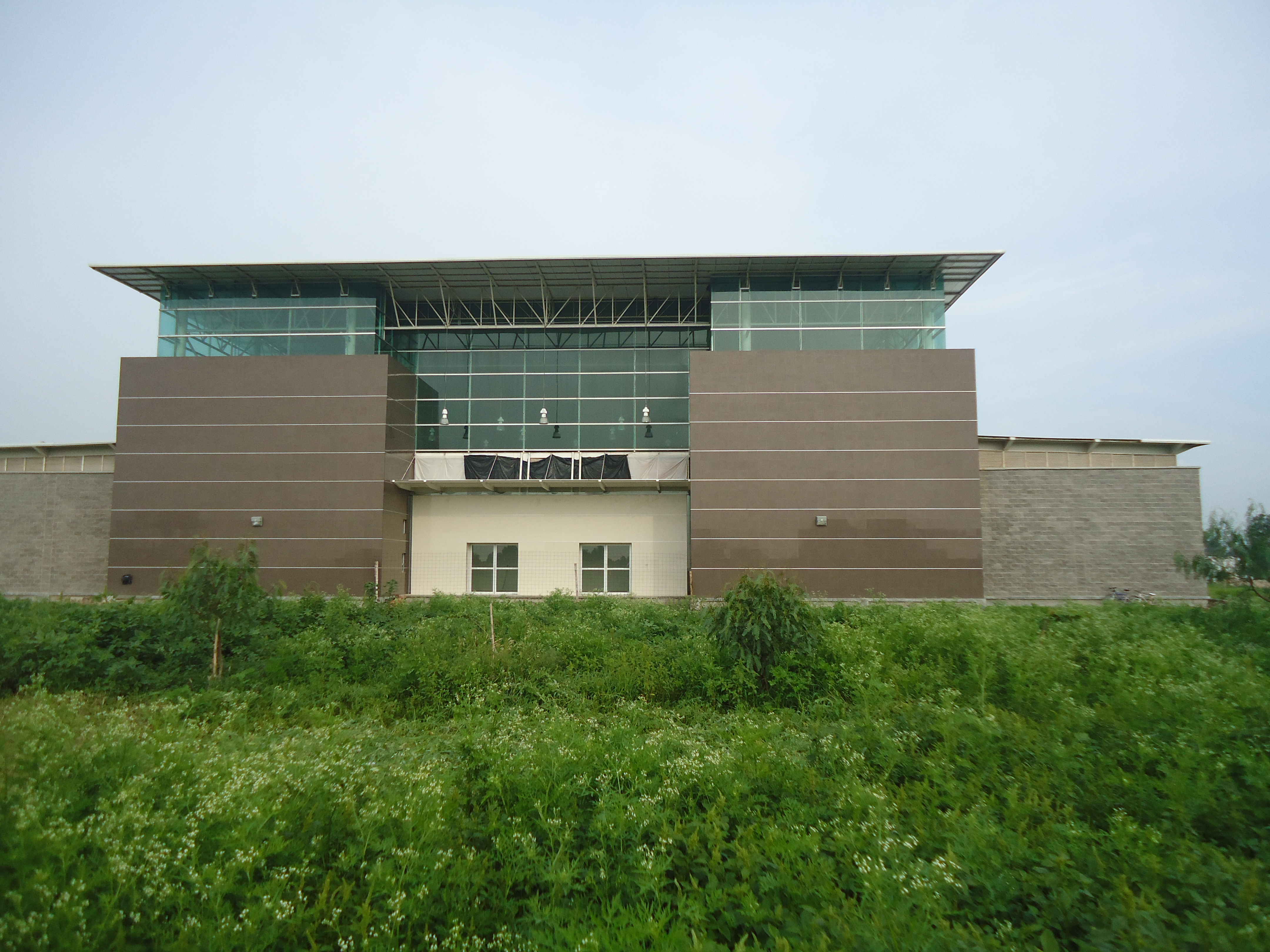 Deportiva valtierrilla comude